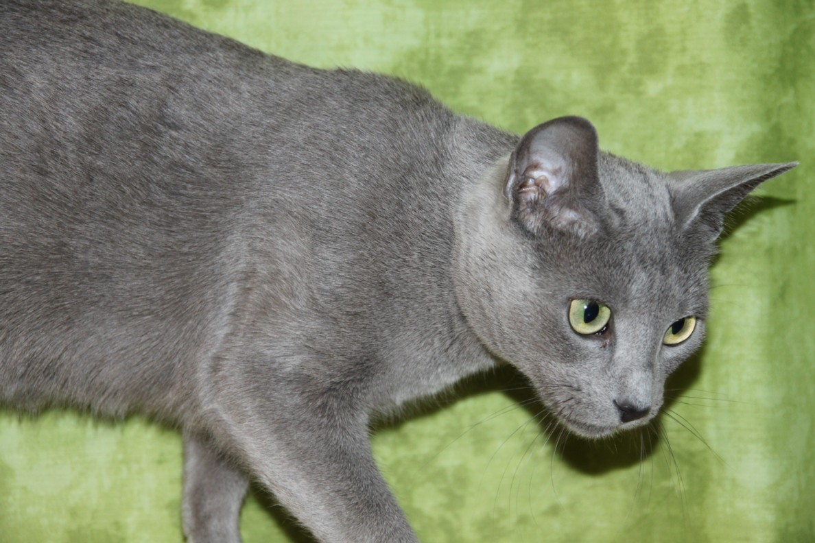 Russisch Blau of Blue Sinfonie